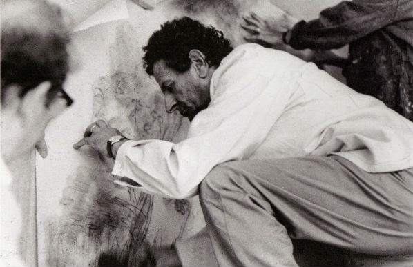 Piero Giunni negli anni '70